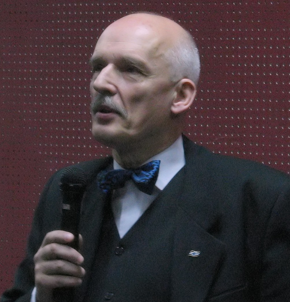 Janusz Korwin-Mikke Author: Mohylek 16:26, 28 March 2007 (UTC)